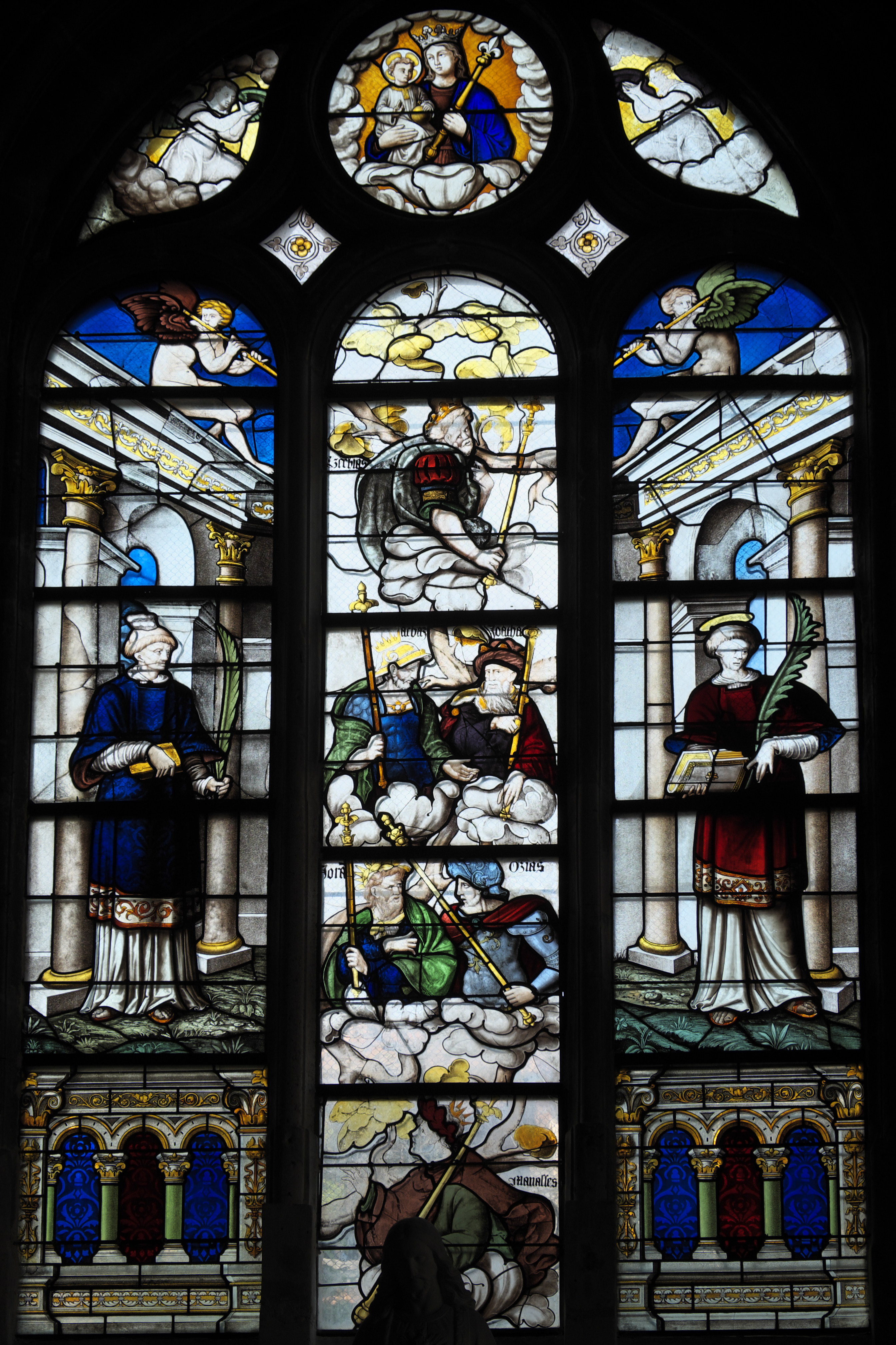 Katholische Pfarrkirche Saint-Germain in Andrésy im Département Yvelines (Île-de-France/Frankreich), Bleiglasfenster aus der Mitte des 16. Jahrhunderts; Darstellung: Zwei Diakone, Fragmente eines Wurzel-Jesse-Fensters; oben: Madonna mit Kind